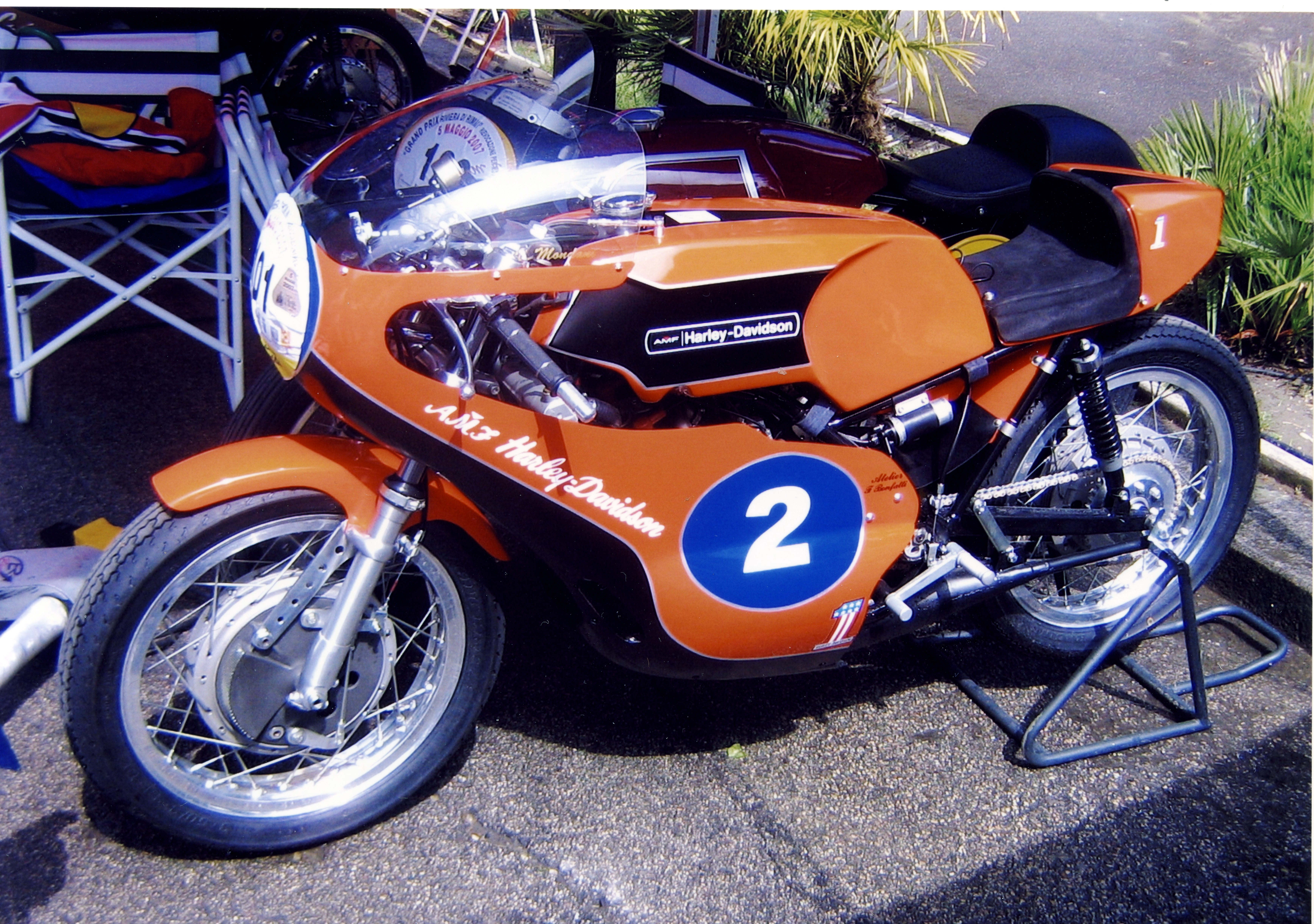 Aermacchi Harley-Davidson RR esposta a Rimini durante il Pasolini Day del 2007